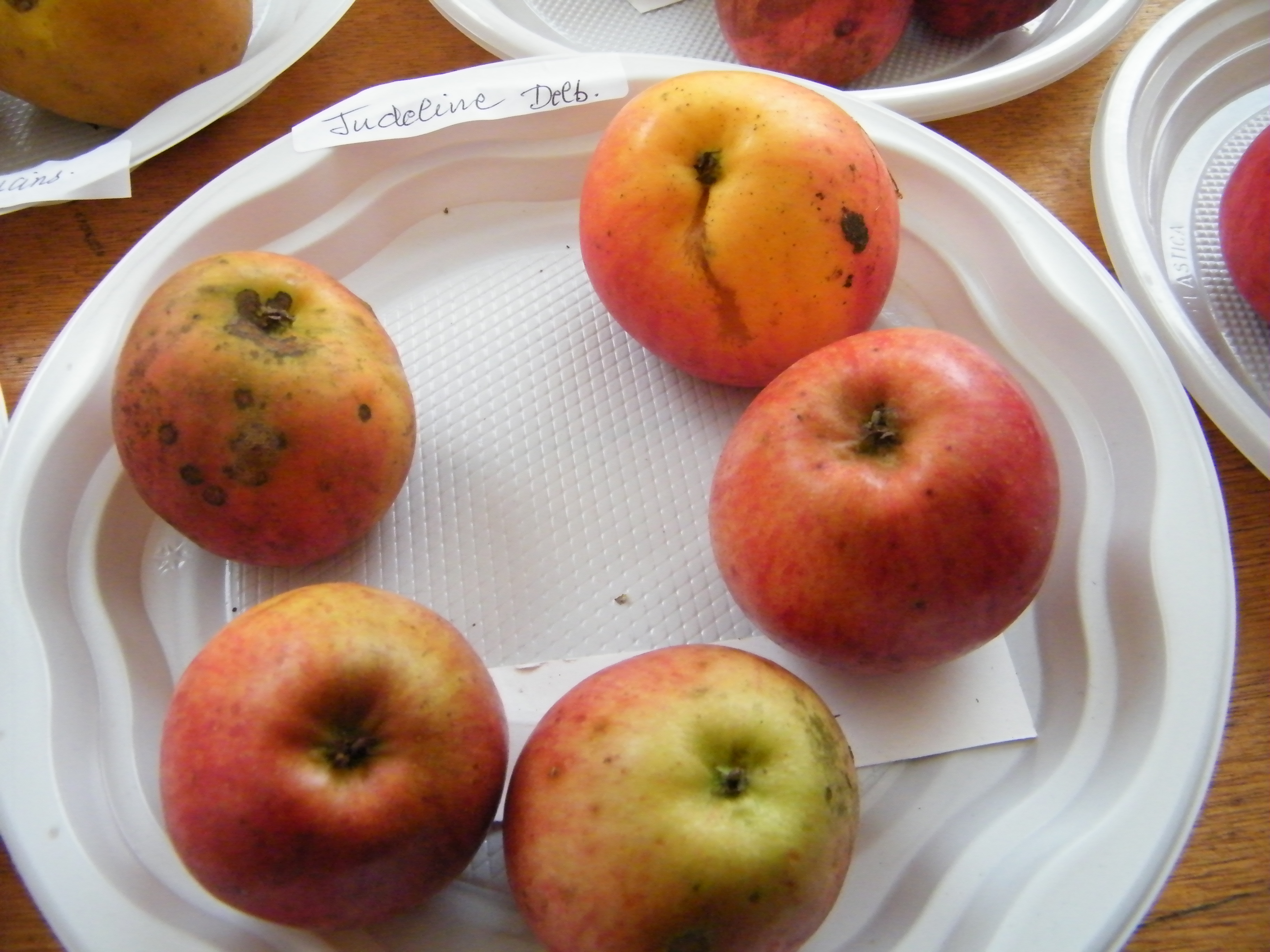 Judeline, Mons-Boubert, Somme, Fr, expo du 29-10-2017 (12)